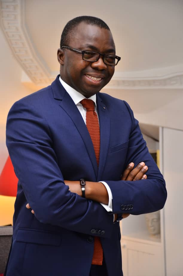 Le constitutionnaliste Frédéric Joël Aïvo lors d'une intervention publique.